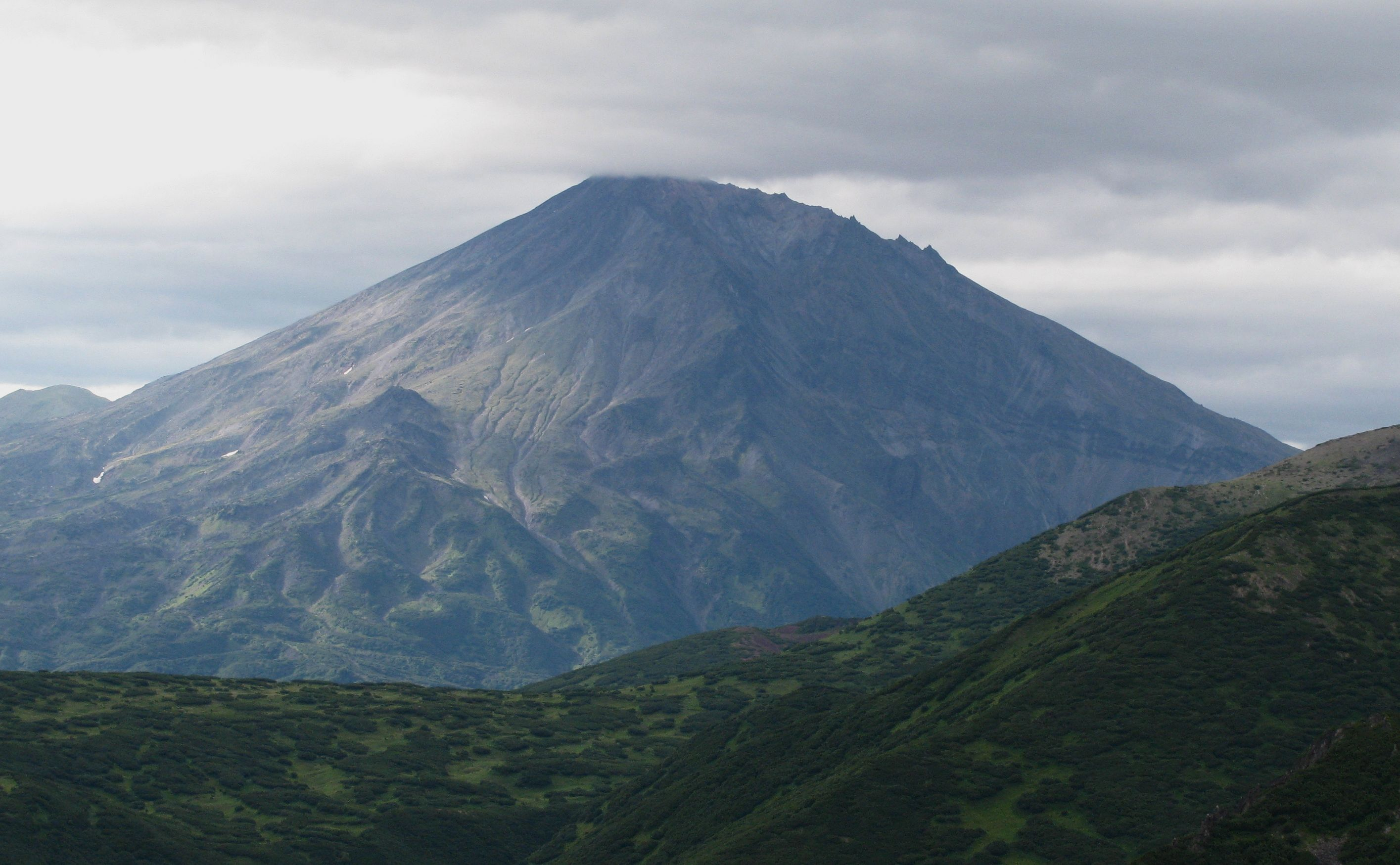 вулкан Бакенинг, полуостров Камчатка